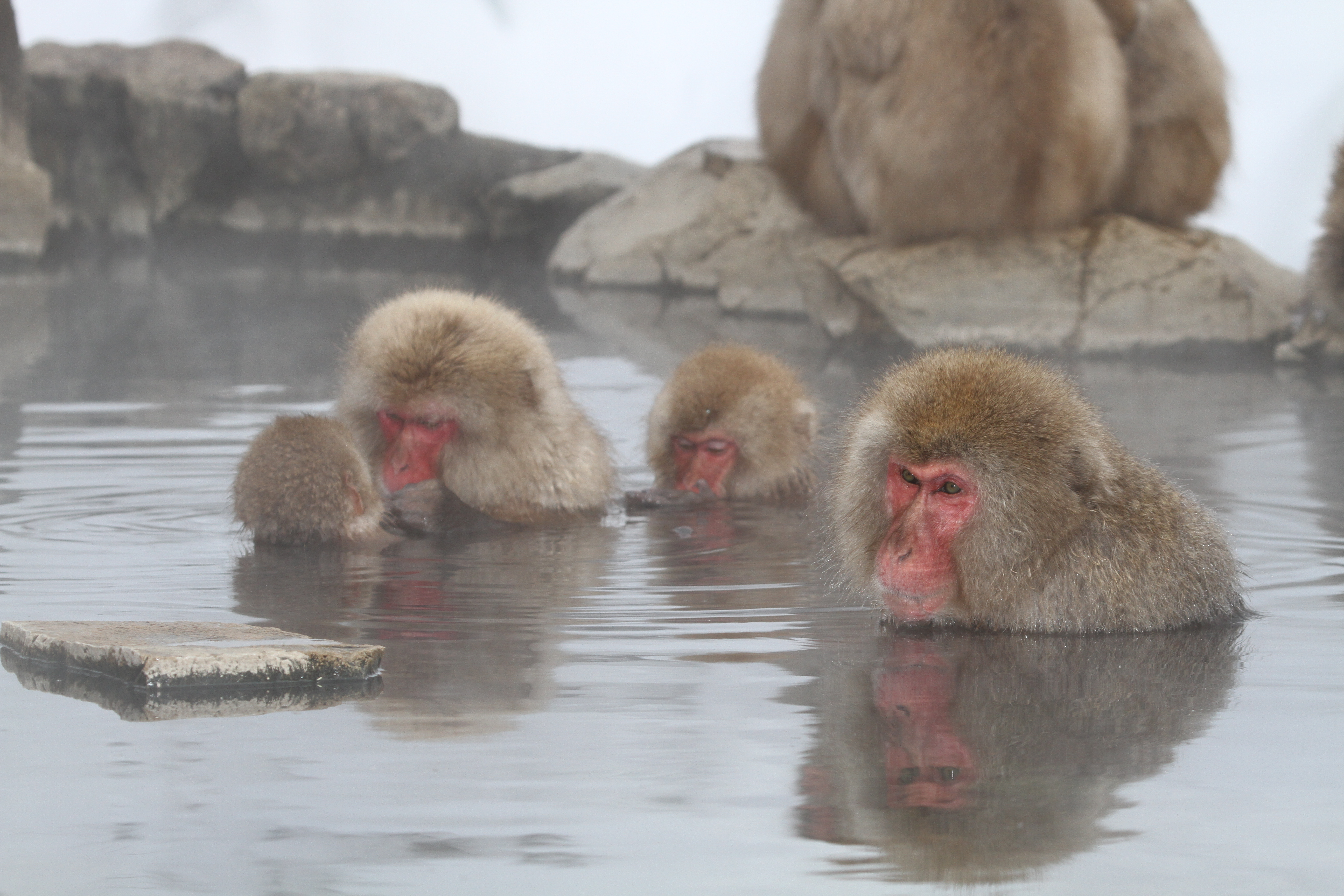 Japanese macaque